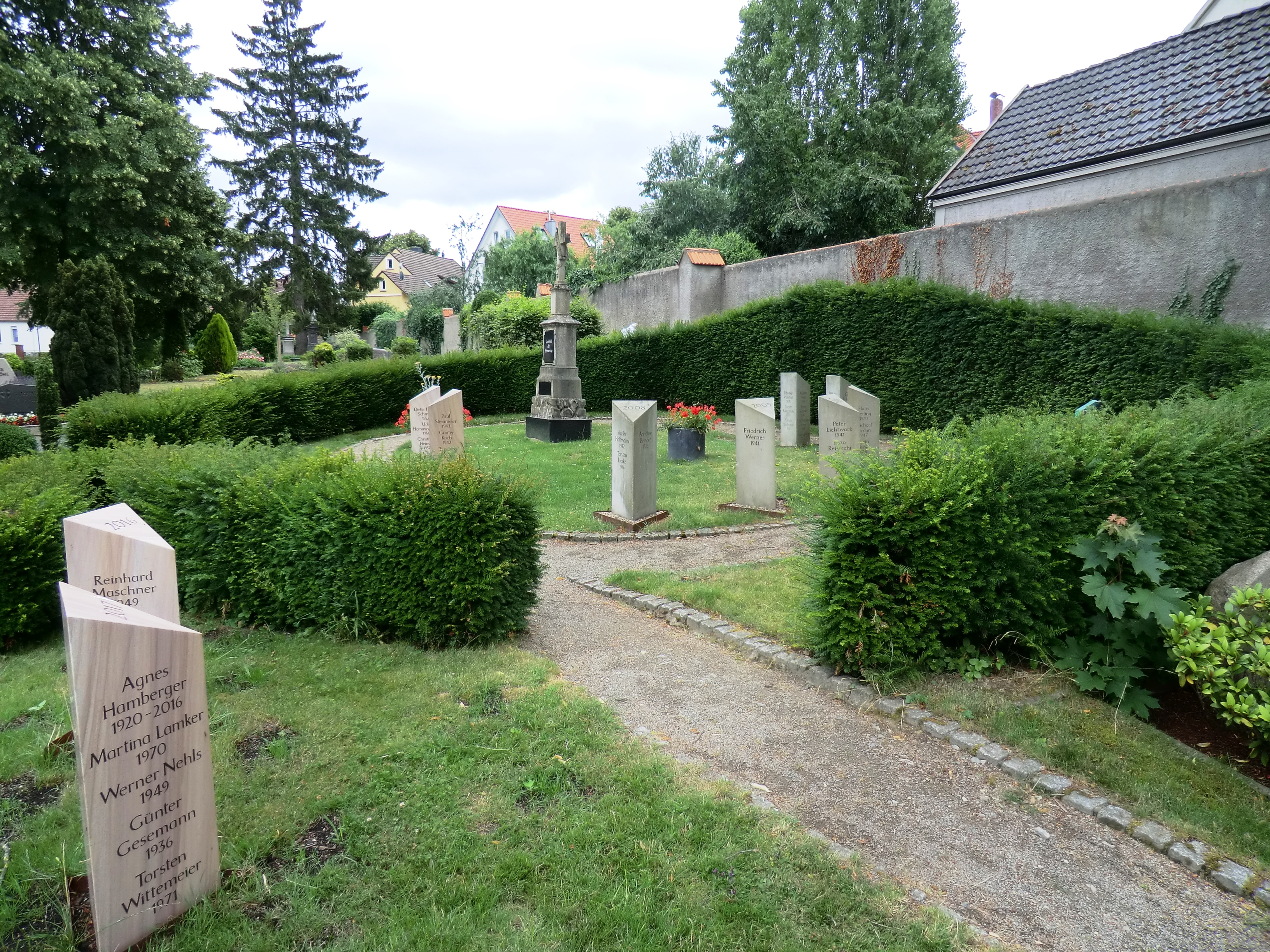 Grabfeld der Erinnerung. Ein Grabfeld für Obdachlose